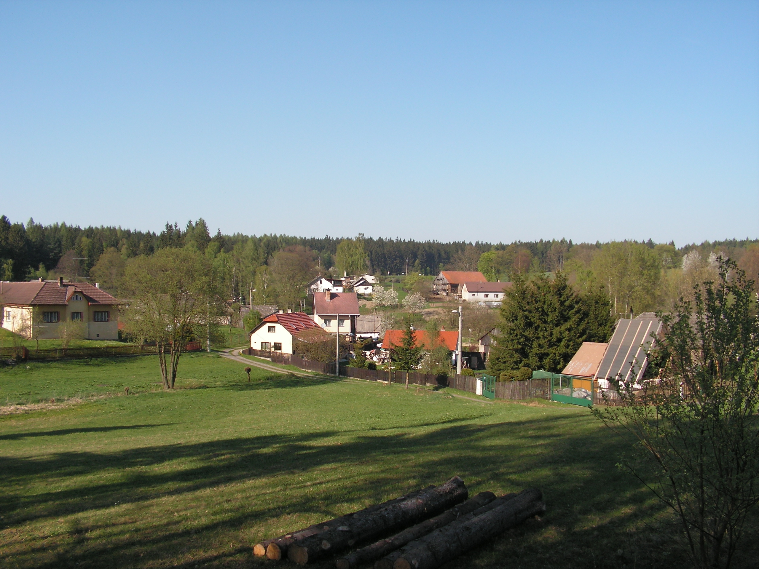 Hostkovice v okrese Kutná Hora